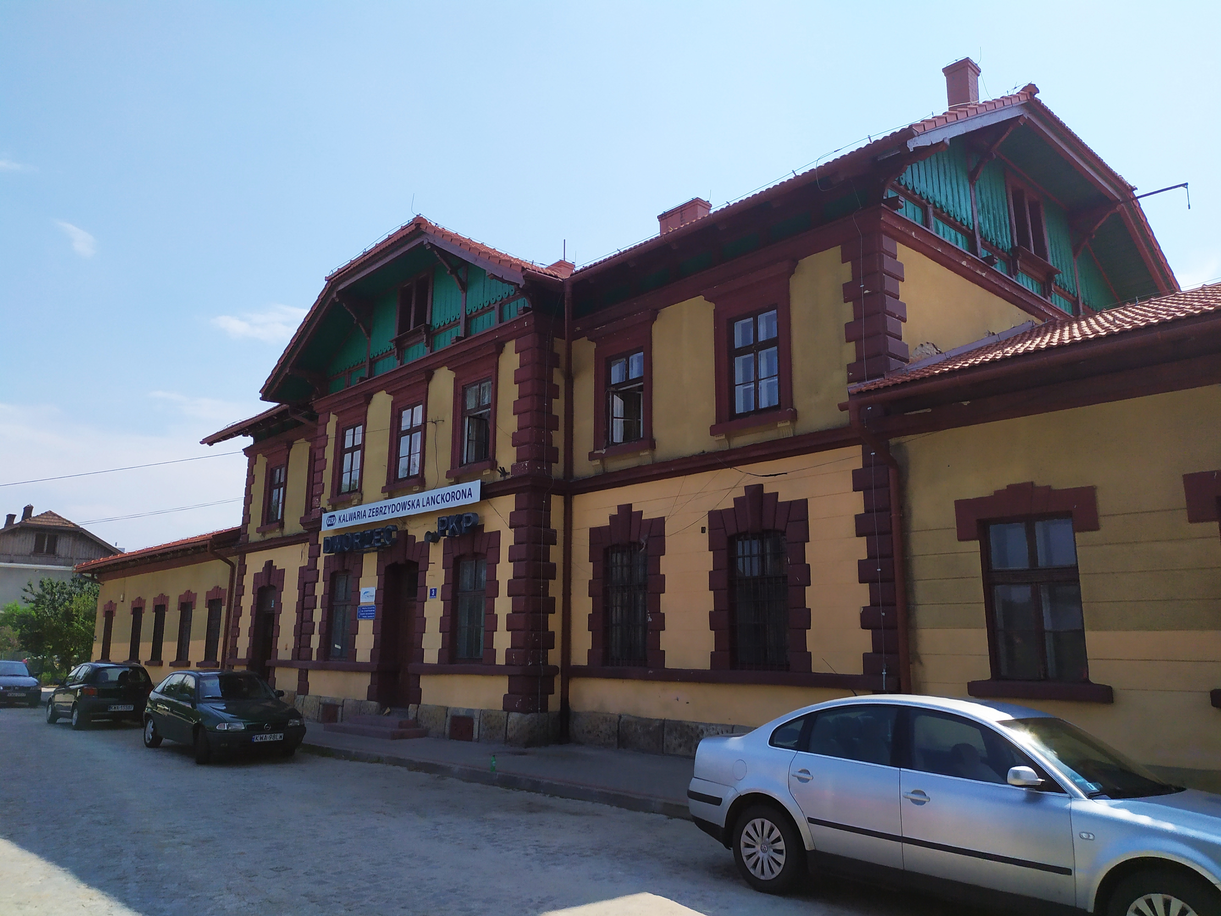 Stacja kolejowa Kalwaria Zebrzydowska Lanckorona (2019)